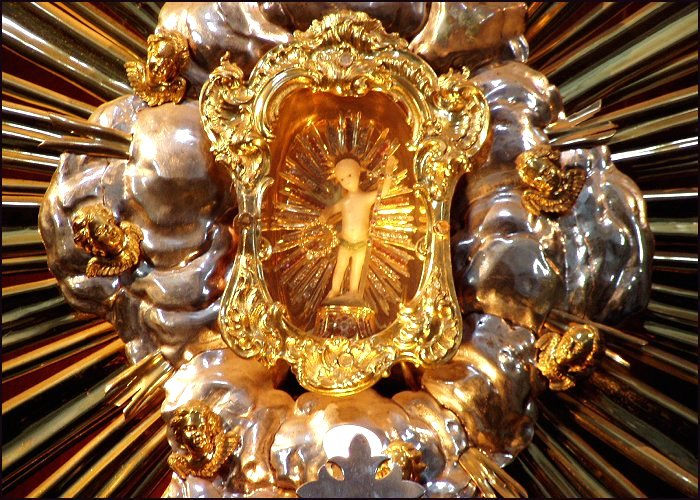 Hochaltar der Wallfahrtskirche mit Christkindl